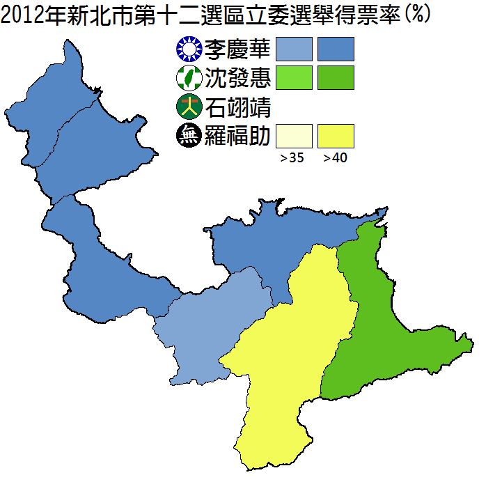 2012年新北市第十二選區立委選舉得票